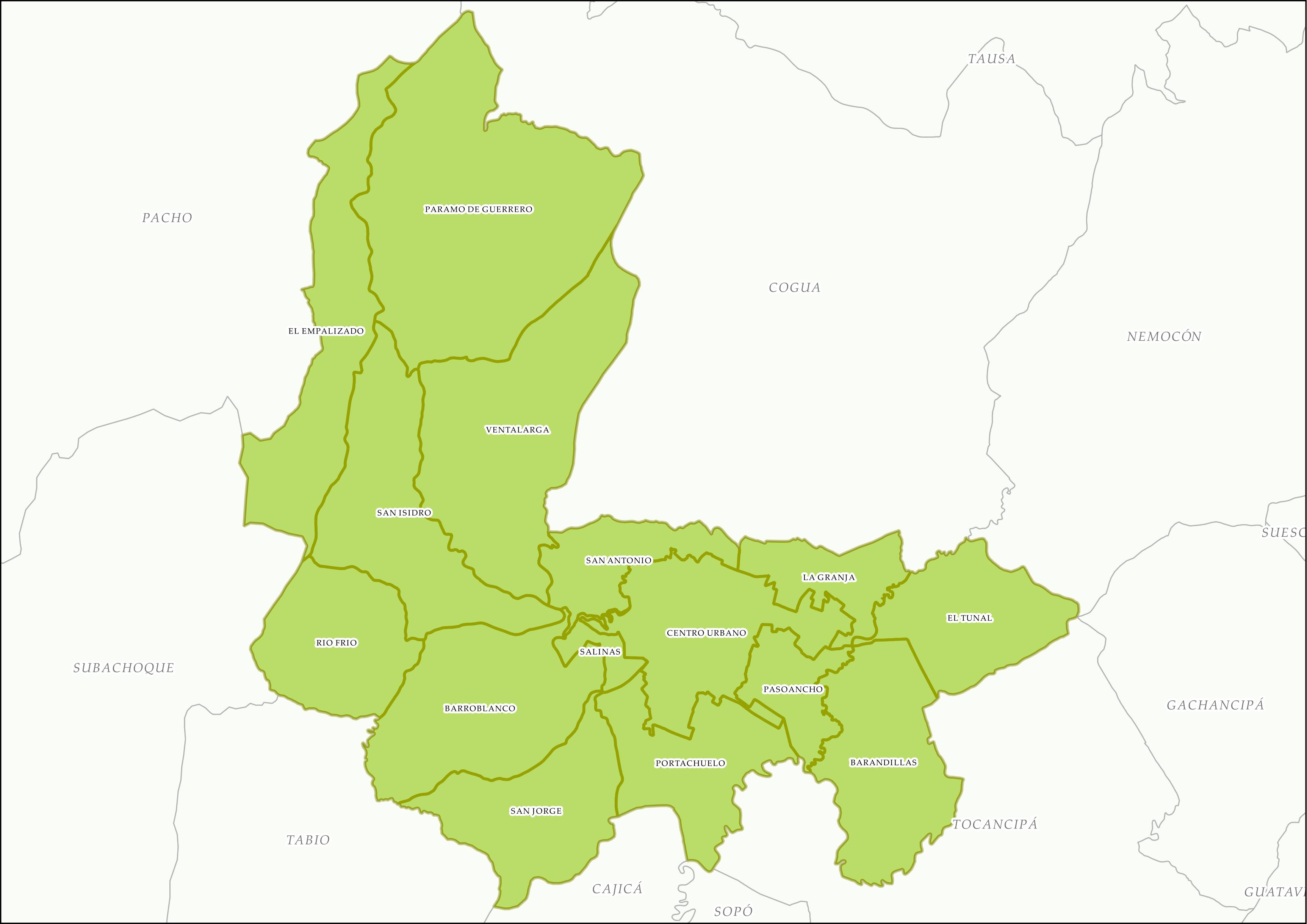 Contiene información sobre la cartografia no oficial sobre las veredas de Zipaquirá. El mapa se realizó utilizando el shapefile que el DANE ofrece al público a manera de referencia.